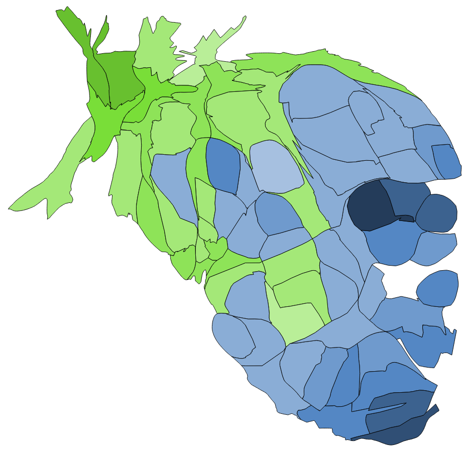 中文（台灣）: 顏色對照表